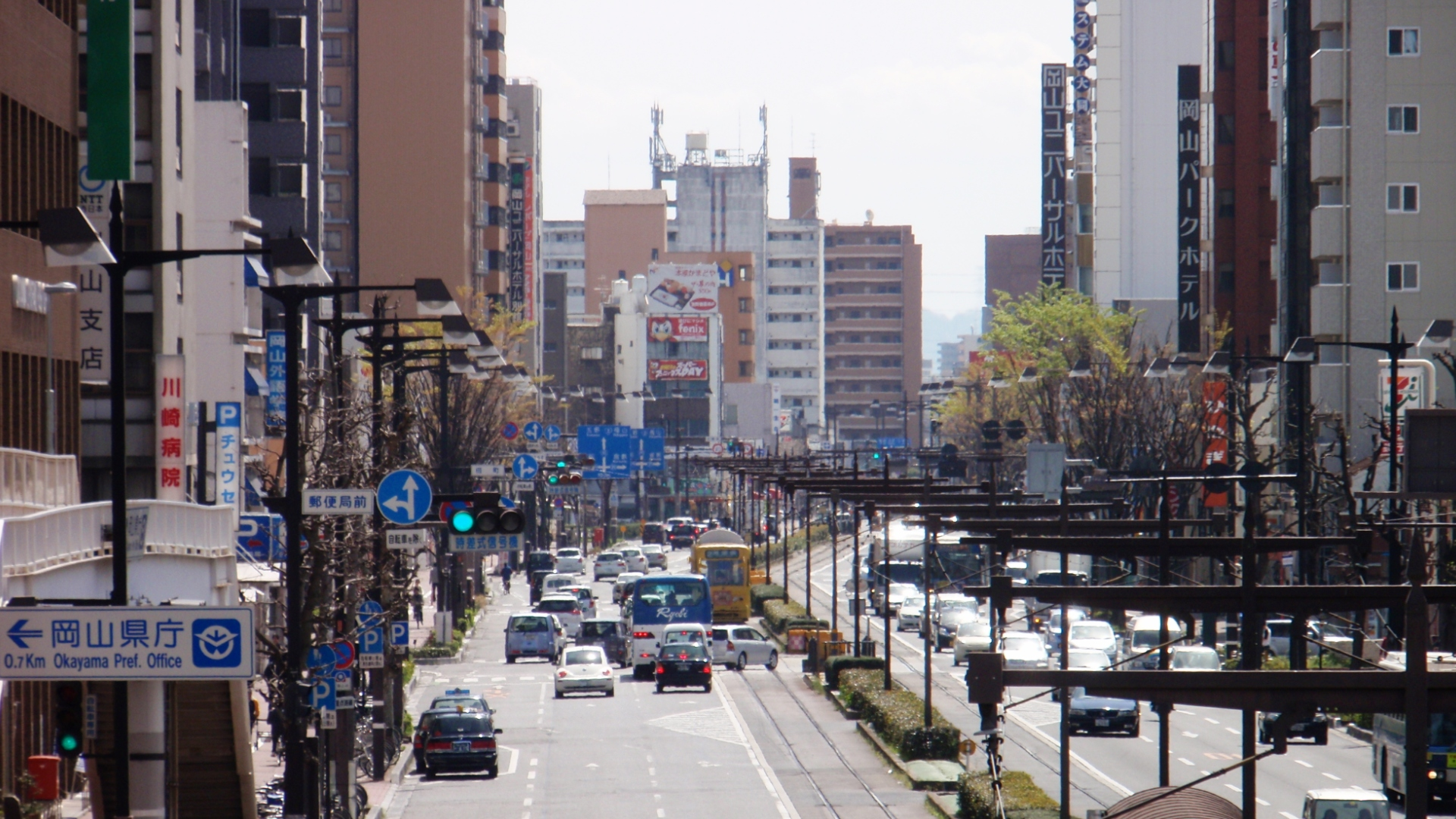 岡山県岡山市北区の国道53号、柳川筋の風景。磨屋町付近から南方向を見る。